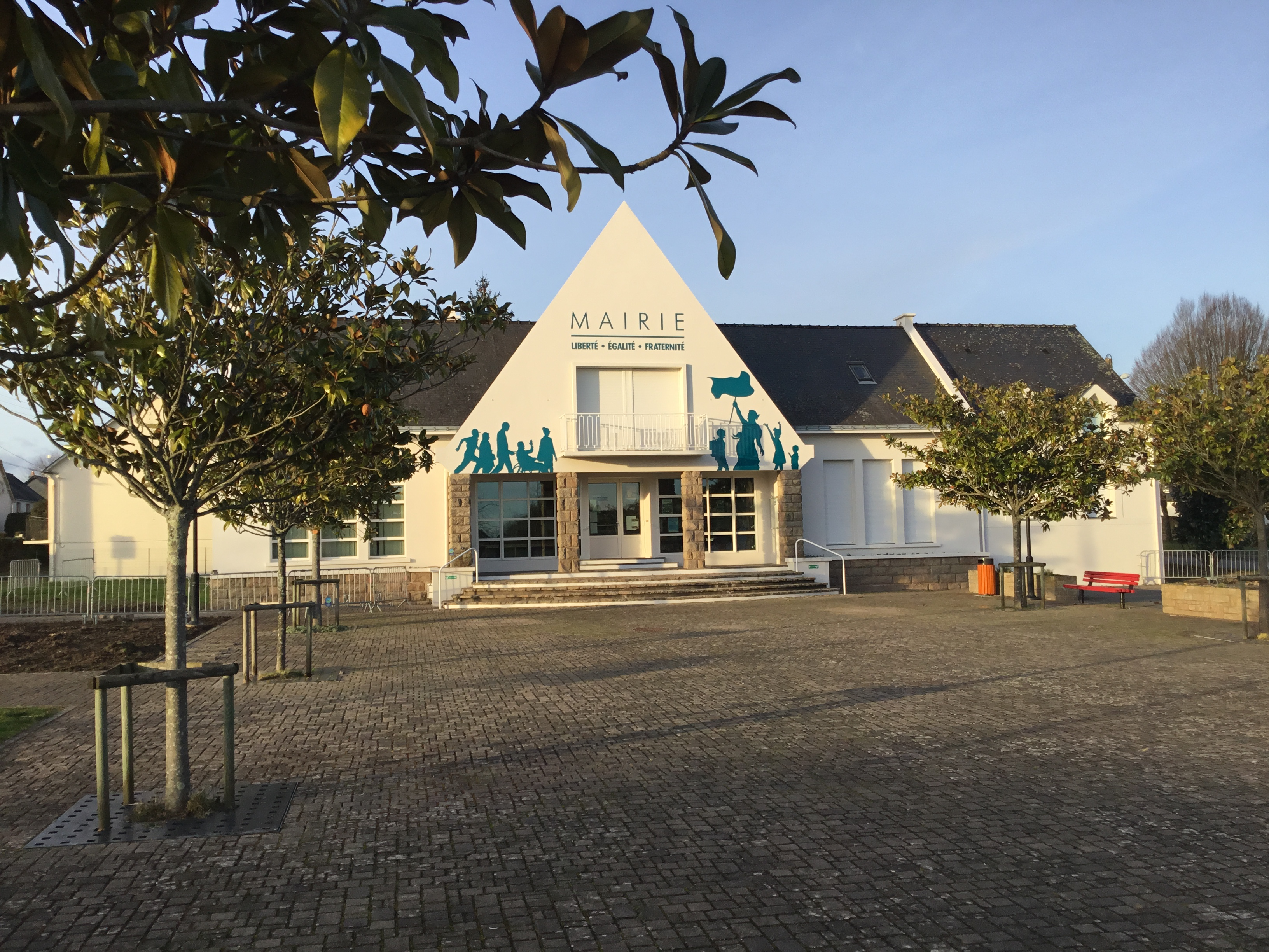 La mairie d'Allaire après les travaux de rénovation de la façade.